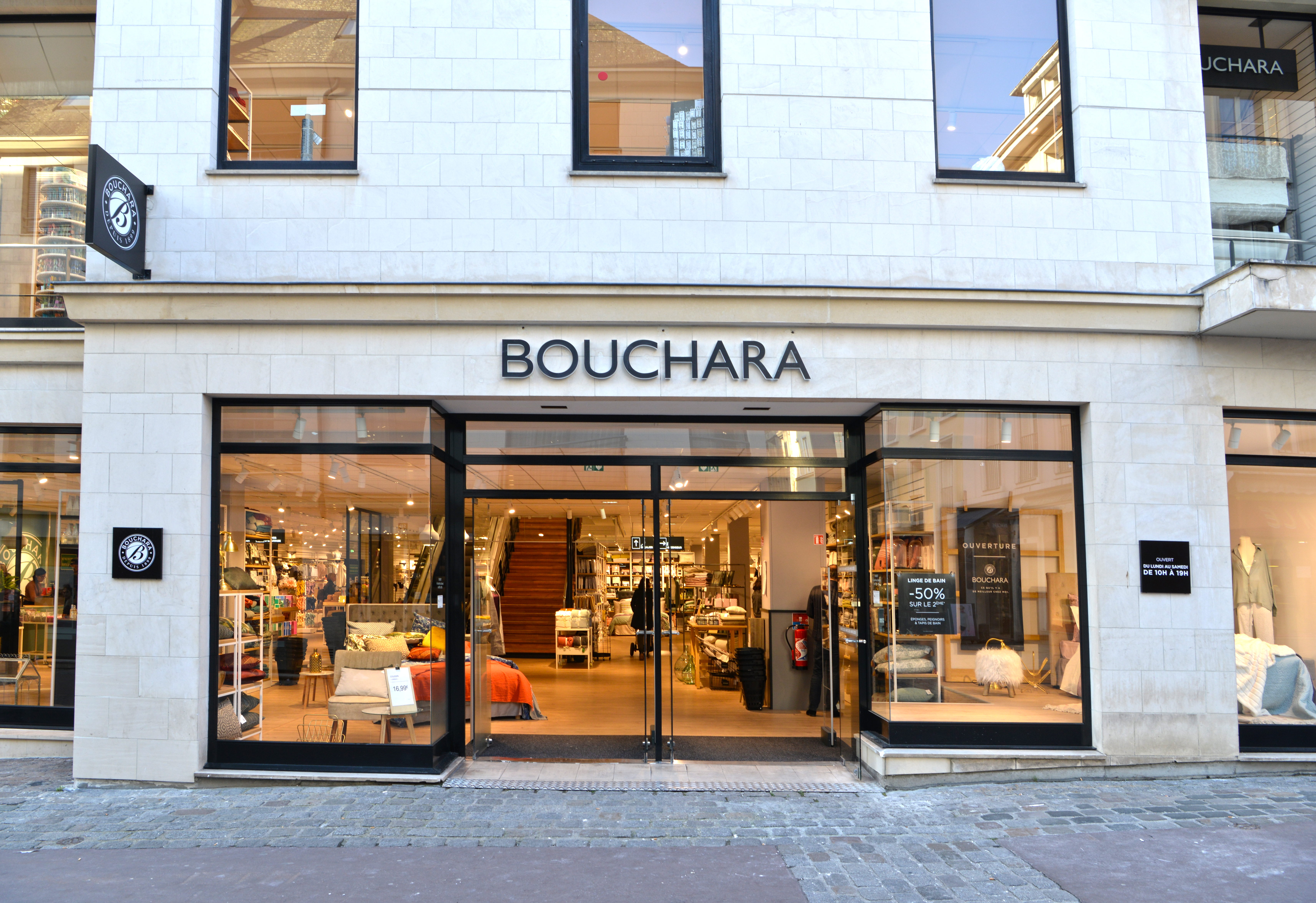 Magasin Bouchara nouvelle génération, à Rouen